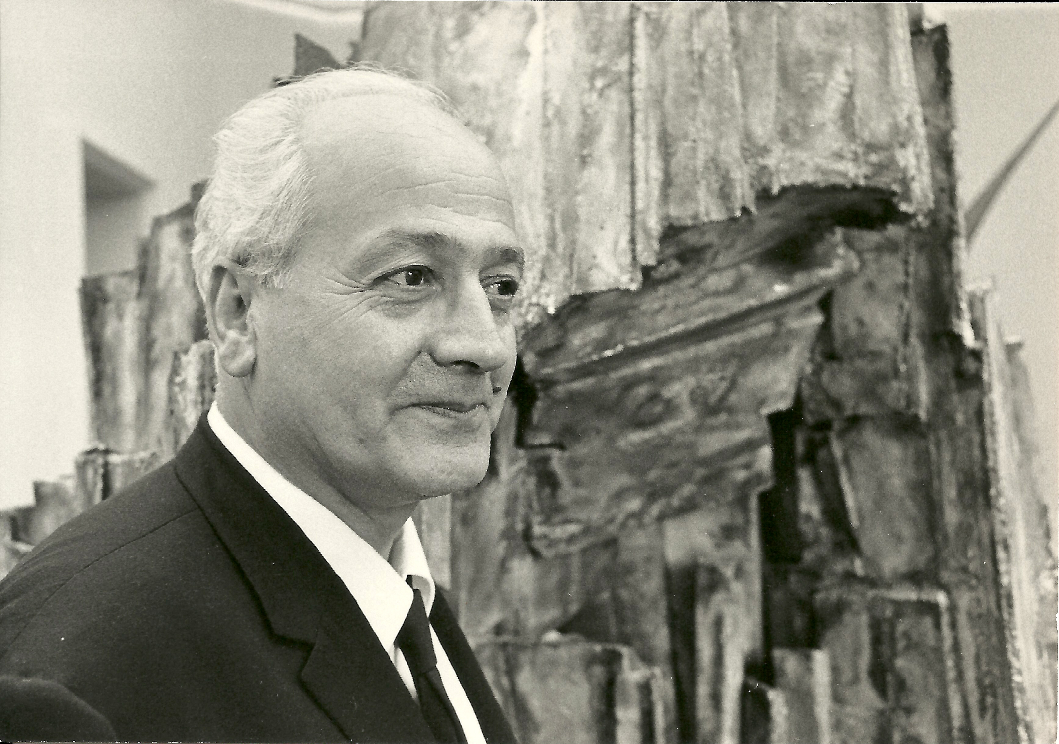 Ο Γιώργος Ζογγολόπουλος μπροστά από το γλυπτό του "Δελφοί", 1964